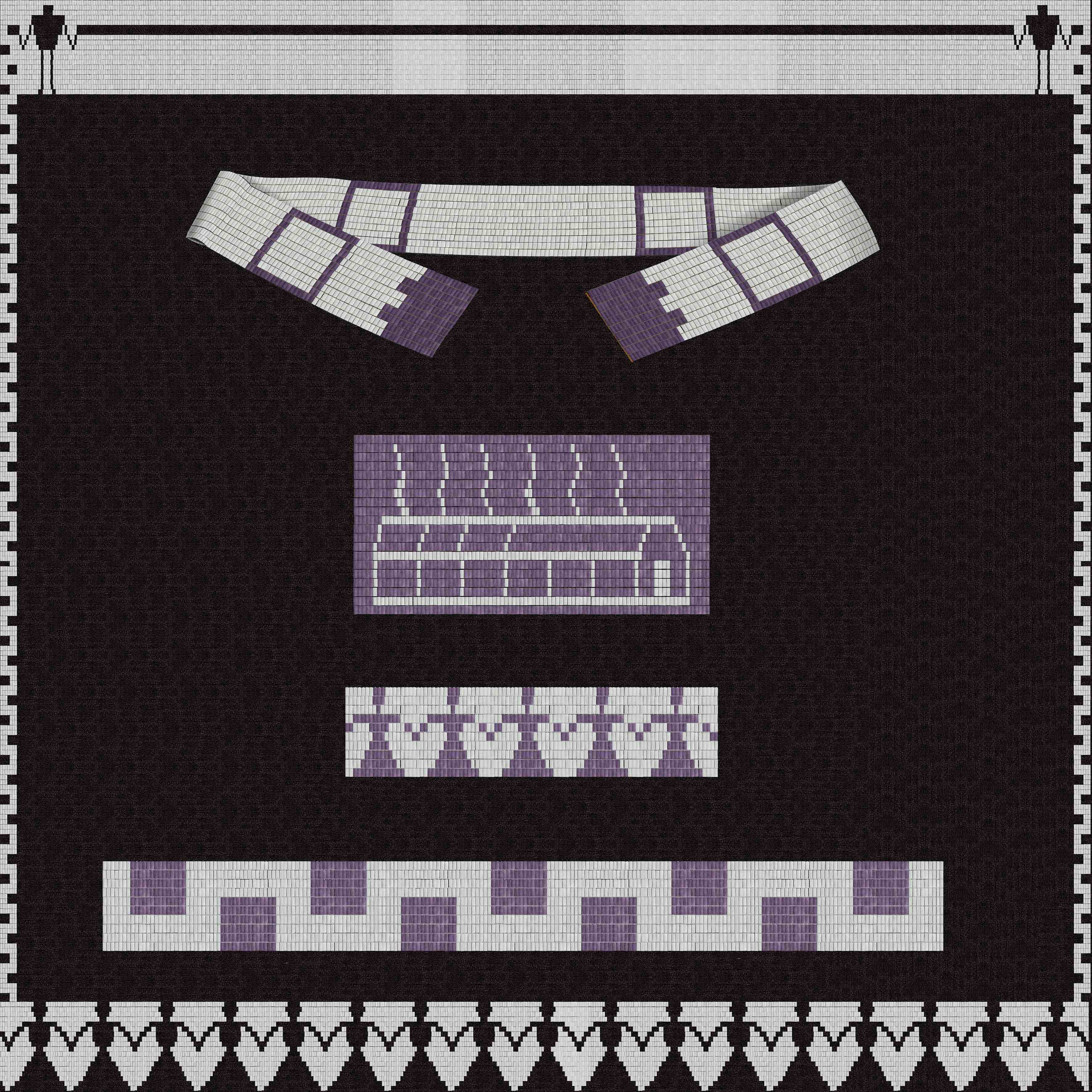 Wampum.